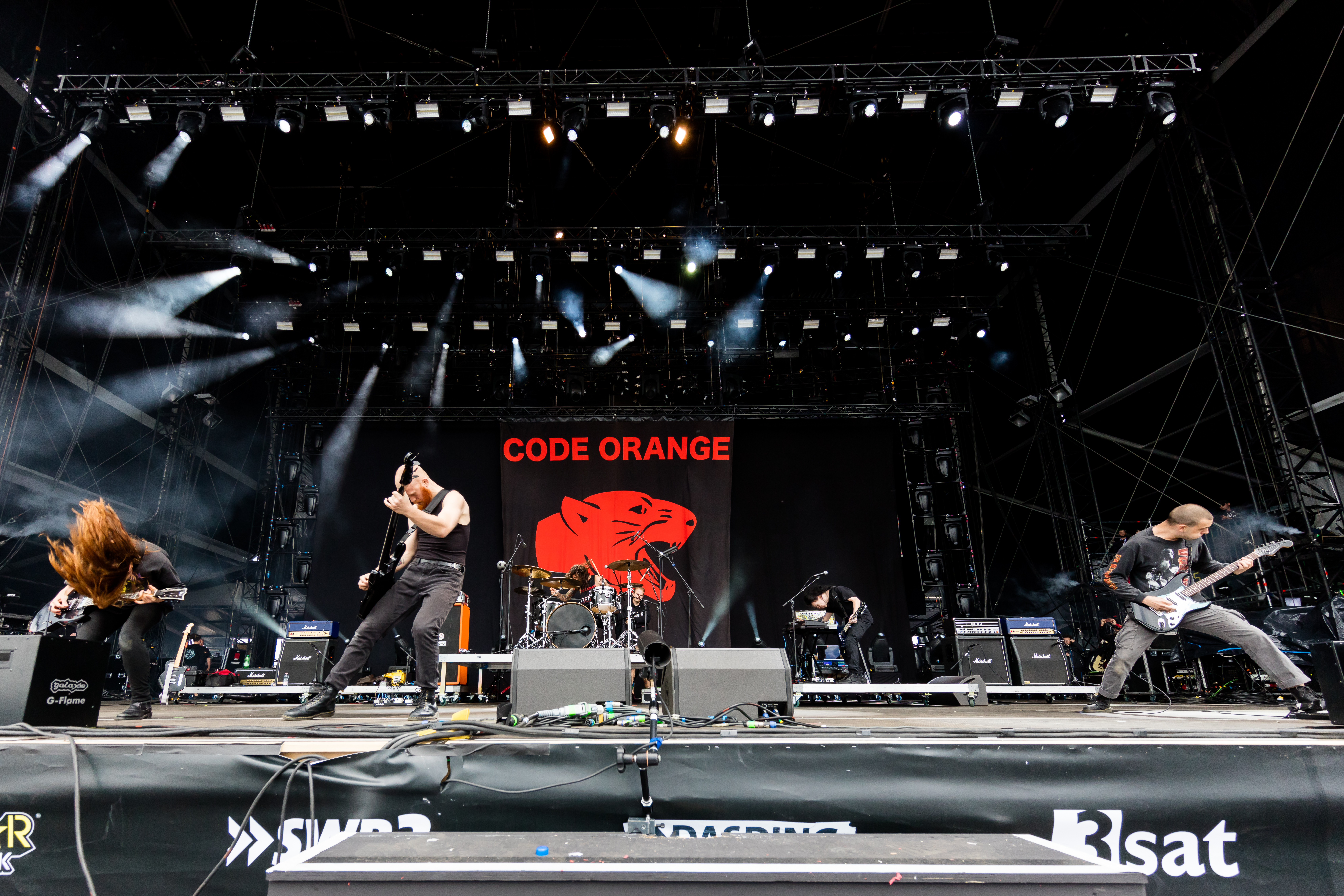 Code Orange during Rock am Ring at Nürburgring, Nürburg, Rheinland Pfalz, Germany on 2017-06-04, Photo: Sven Mandel